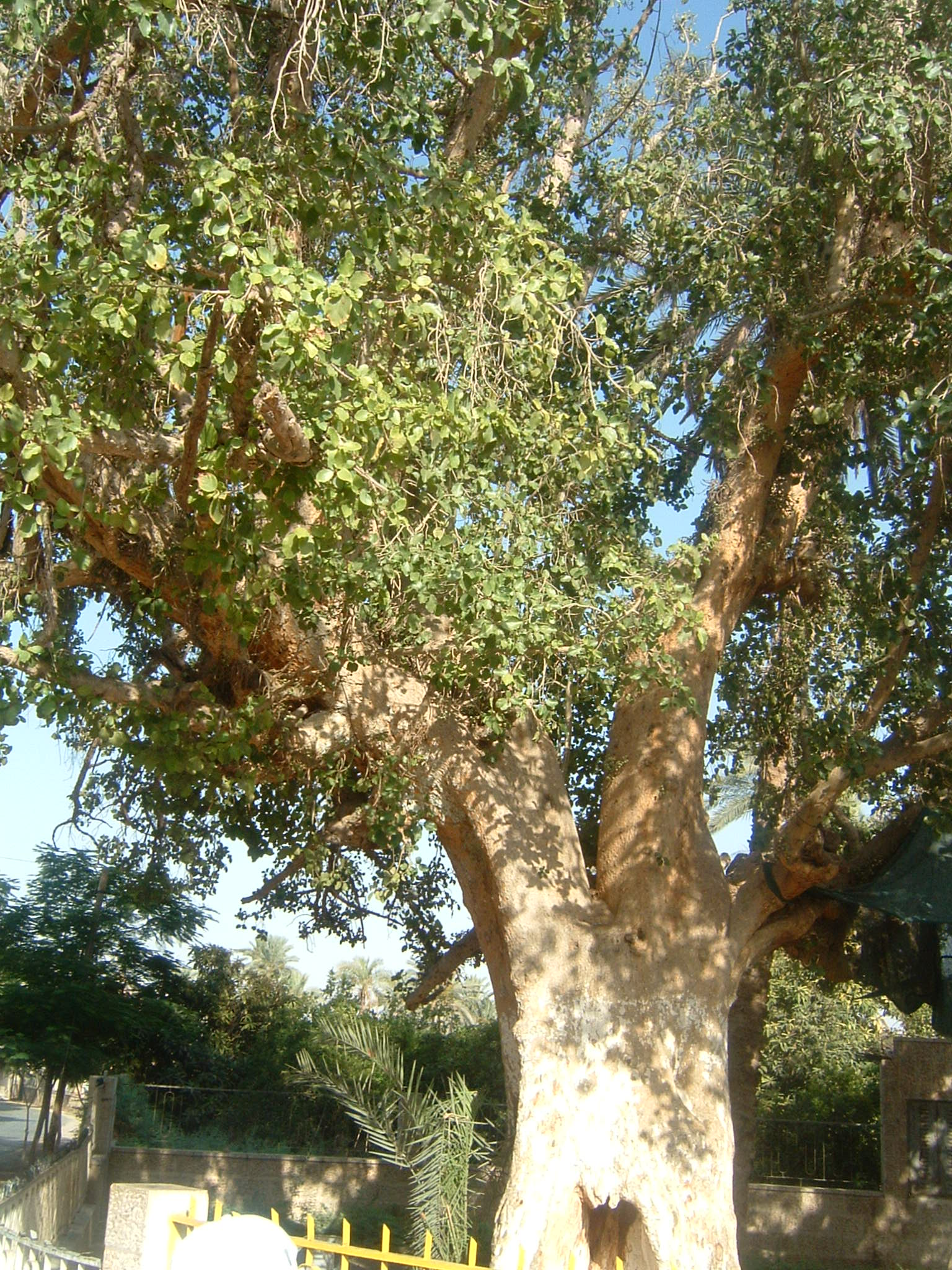 Sicomoro di Gerico Foto scattata da me il 15 giugno 2008